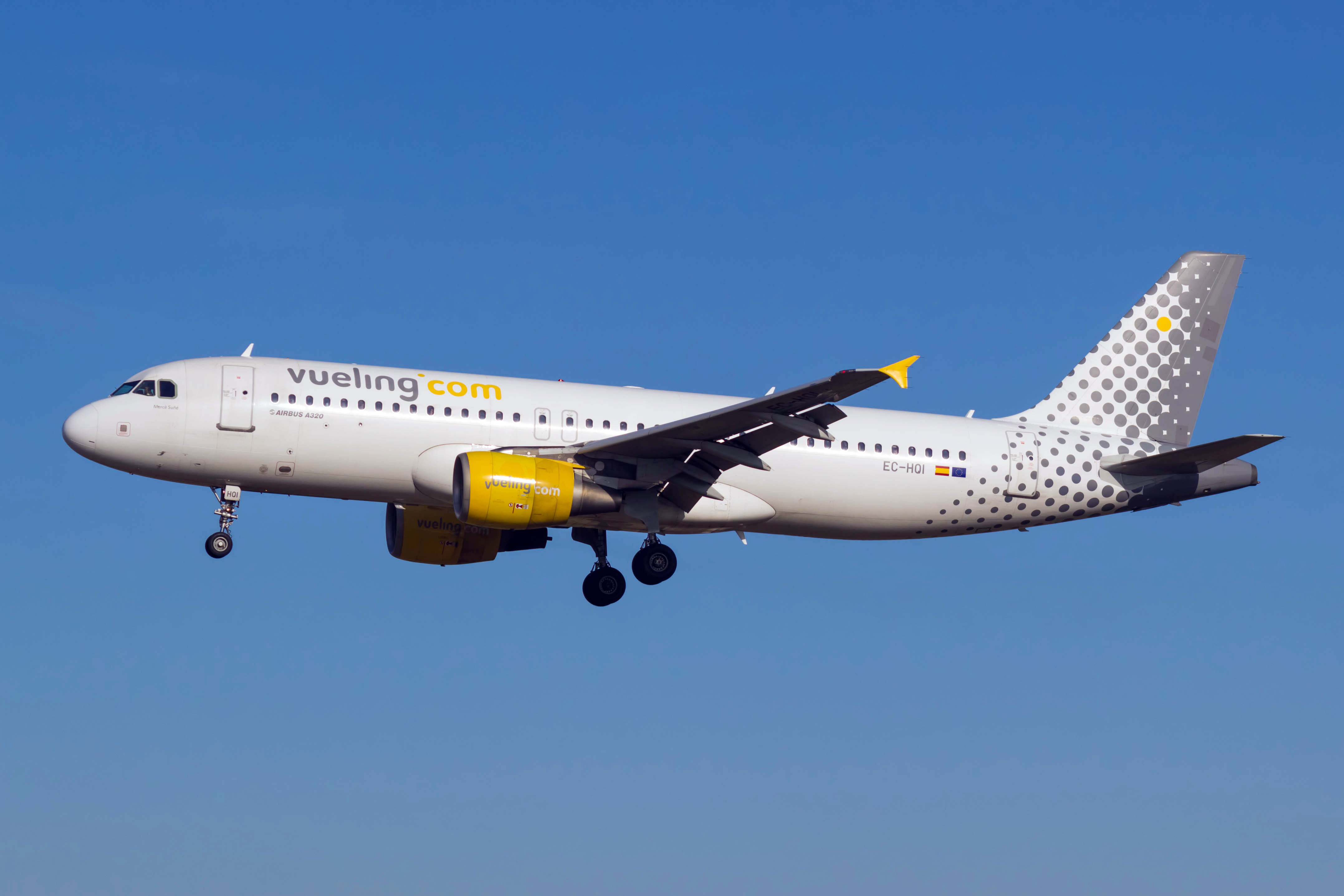 Airbus A320 de Vueling aterrando no aeroporto de Barcelona.